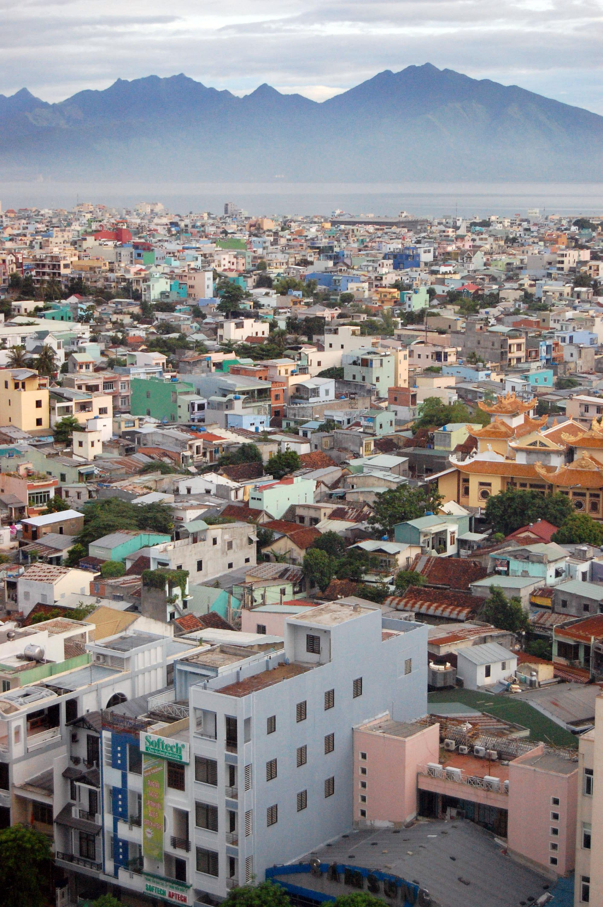 Da Nang skyline.